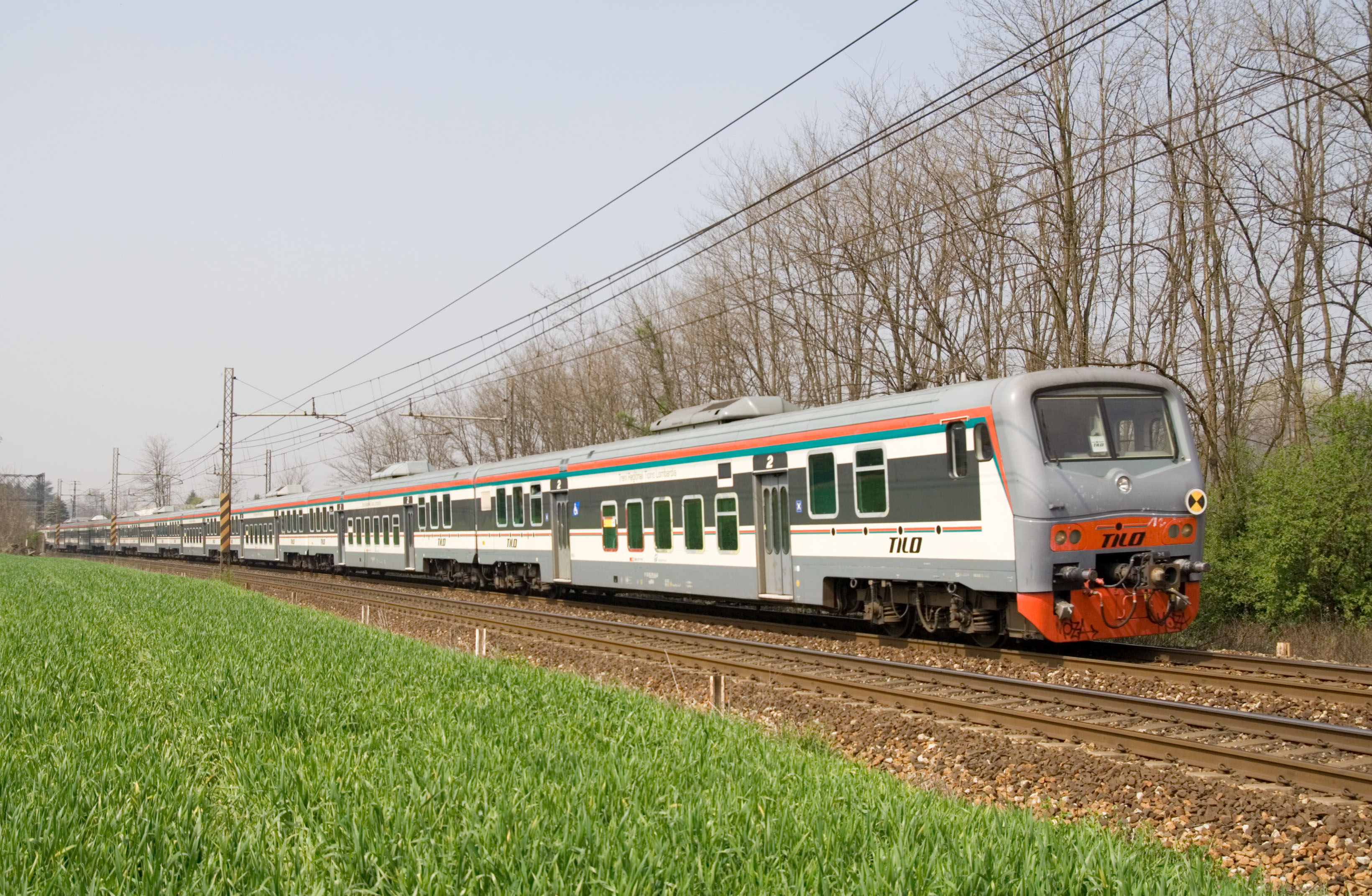 Una composizione di carrozze a piano ribassato delle FS, in livrea TiLo, ripresa fra le stazioni di Carimate e Camnago-Lentate sulla linea suburbana S9 di Milano. Queste composizioni non sono piu' presenti nel parco mezzi di Trenord che ora gestisce la linea S9.